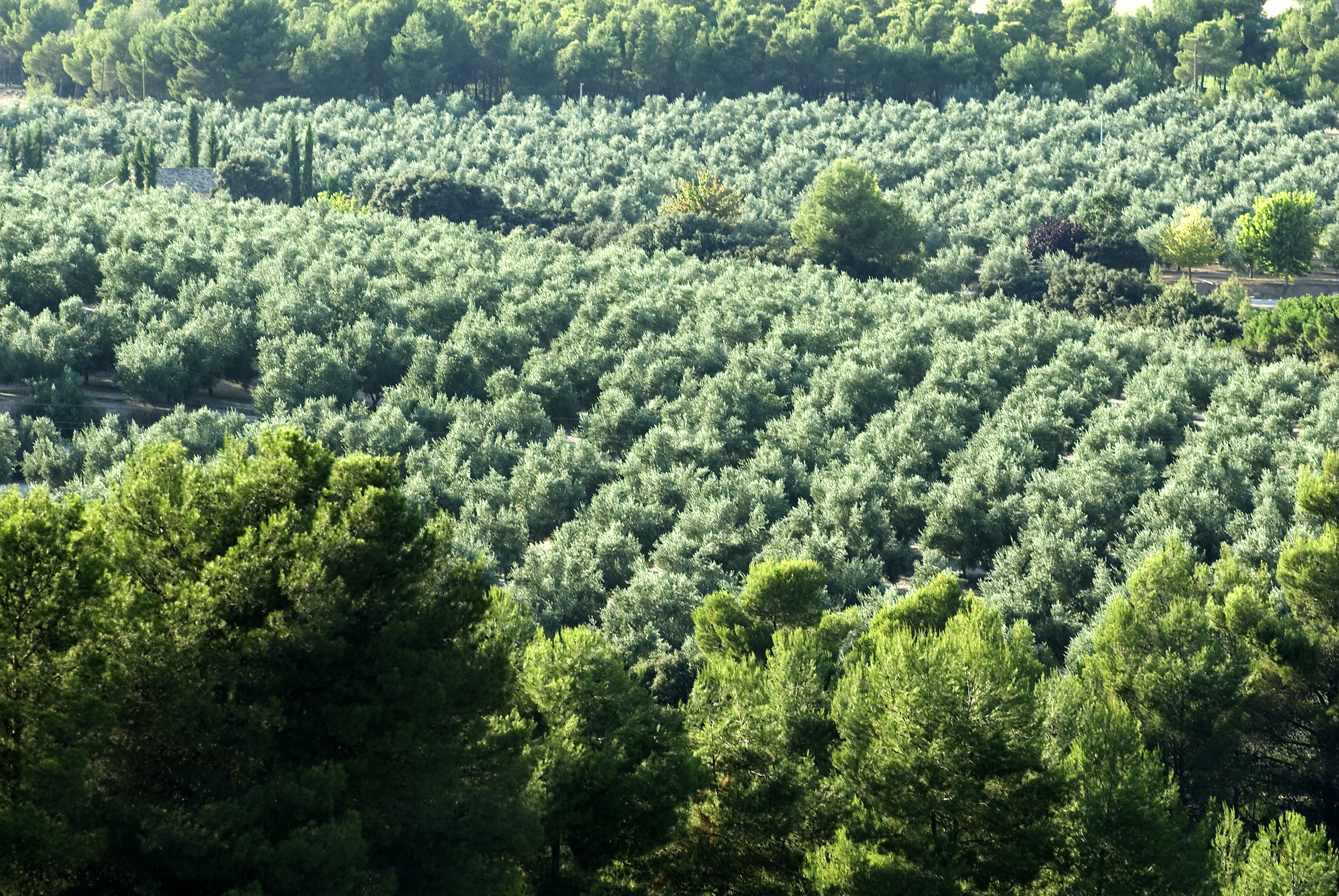 Olivar Masía el Altet